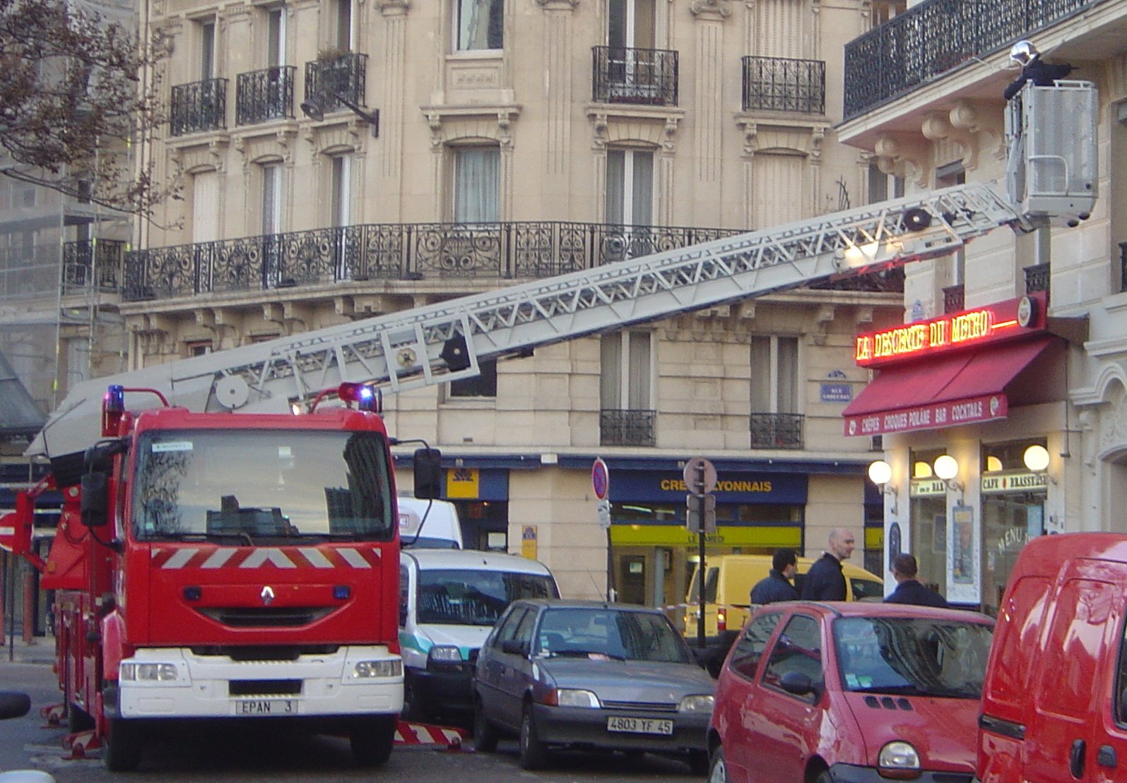 Brigade de Sapeurs-Pompiers de Paris, Place d'Italie (13ème), accompagnés de policiers, 2006-01-25